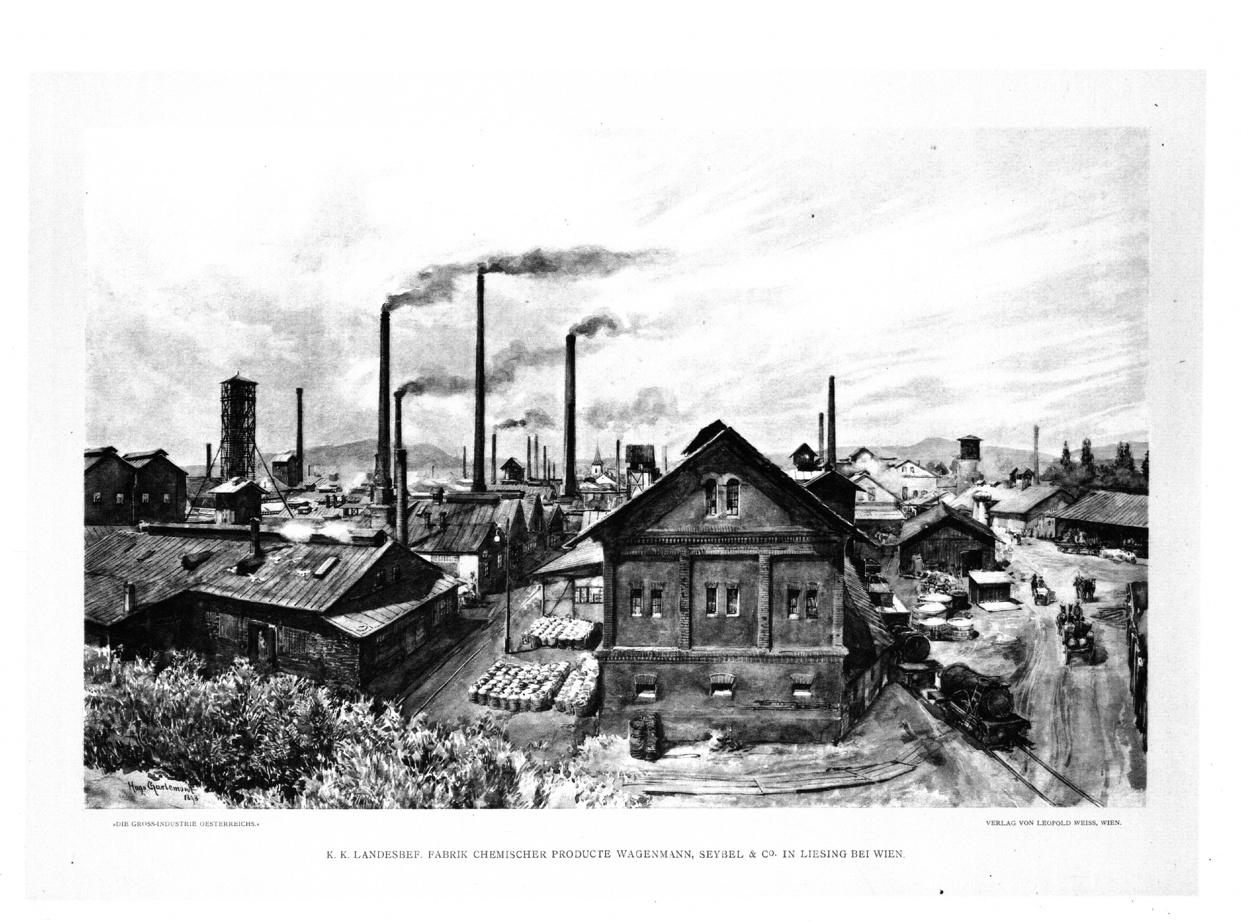 Gelände des Chemiebetriebes Wagenmann, Seybel & Cie in Liesing bei Wien, 1898